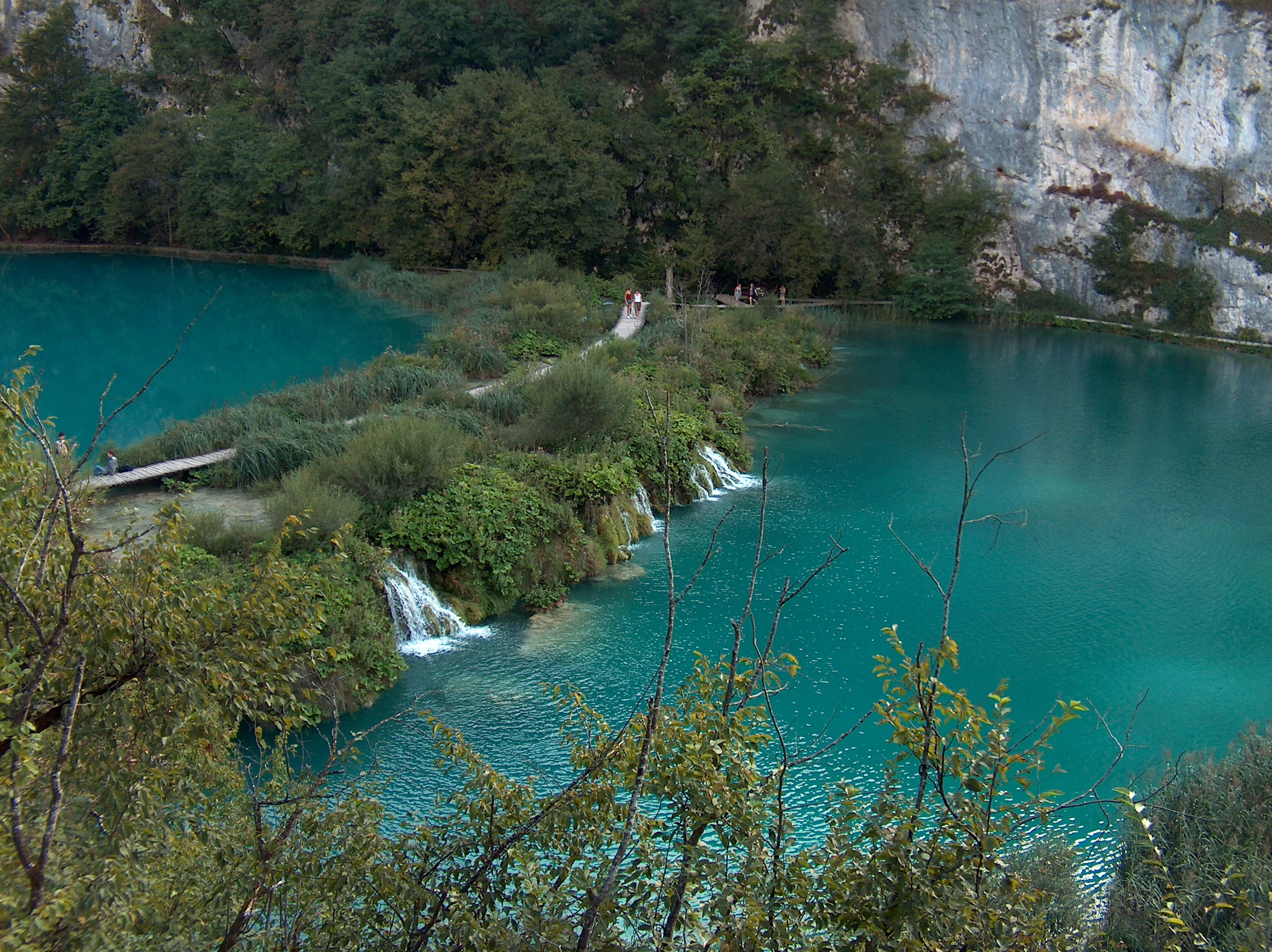 Jeziora Plitvickie 2006r., (